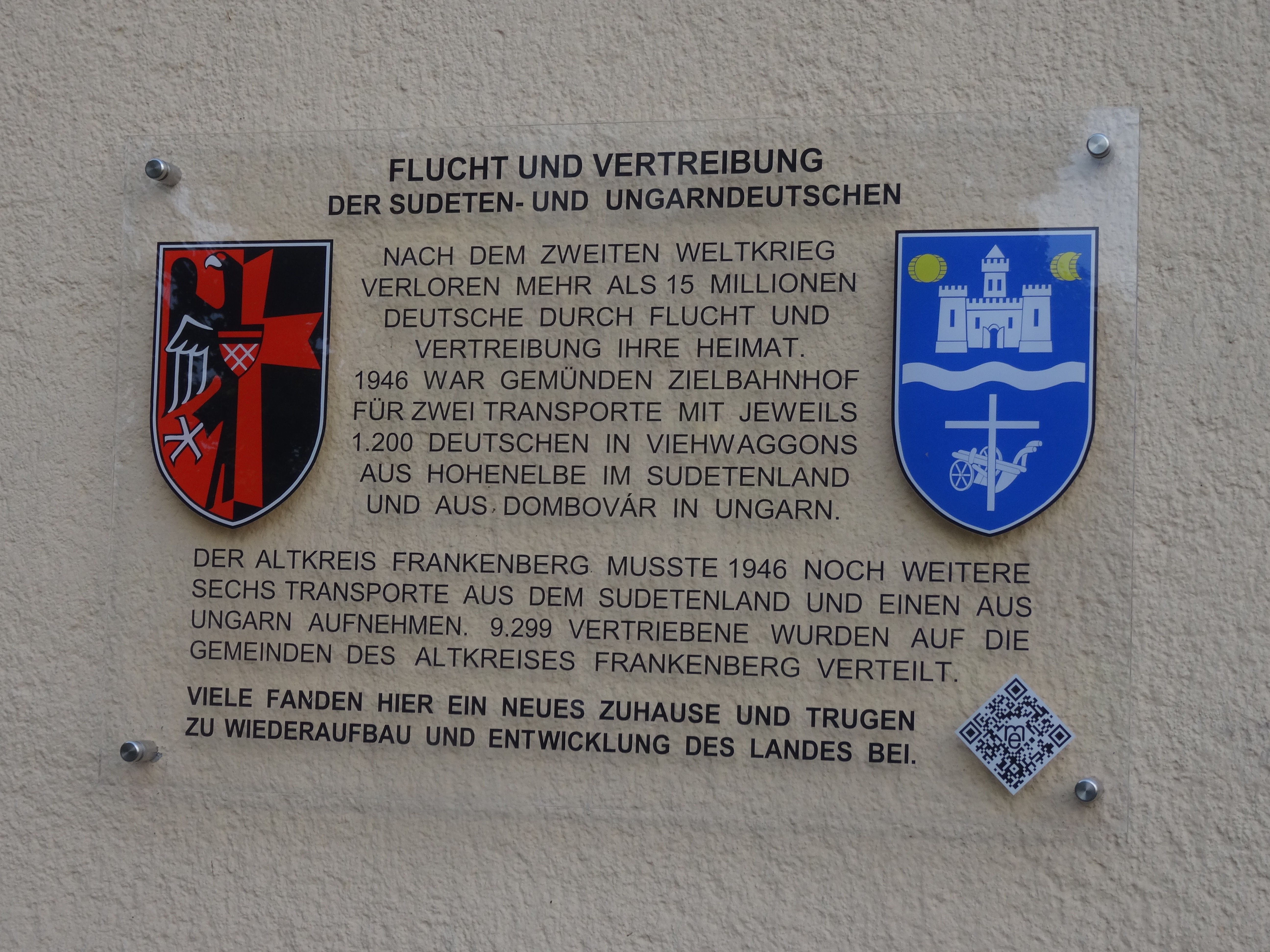 Die Gedenktafel die Transporte der Heimatvertriebenen aus Hohenelbe Riesengebirge, Sudetenland, 1200 Personen, Ankunft am 10 März 1946, und 1200 Personen aus Dómbovár, Ungarn, Ankunft am 13. Juni 1946, wurde am damaligen Bahnhof Gemünden/Wohra am 30. Juli 2018 enthüllt. Die Enthüllung wurde vom Mitinitiator Horst W. Gömpel, Bürgermeister Frank Gleim, Günter Krause, Kreisvorsitzender BdV. Margarete Zieglerr-Raschdorf, Vertriebenenbeauftragte der Hessischen Landesregierung, Markward Lilienthal, Gestalter der Tafel und den Zeitzeigen Otto Renner ( Sudetendeutsche ) und Johann Geigl ( Ungarndeutsche ) enthüllt.